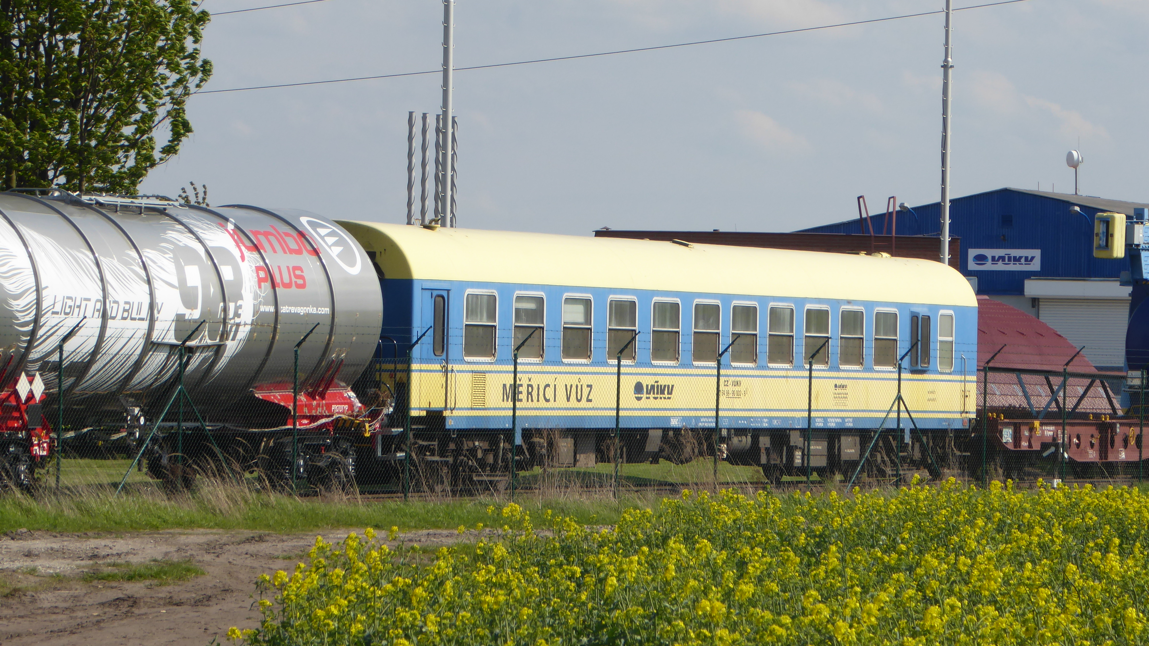 Messwagen 60 54 99-90 003-9 des VÚKV (Forschungsinstituts für Schienenfahrzeuge) auf dem Eisenbahnversuchsring Velim (CZ)